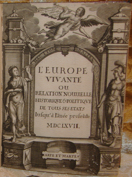 Couverture du livre "L'Europe vivante" de Samuel Chappuzeau édité en 1667.